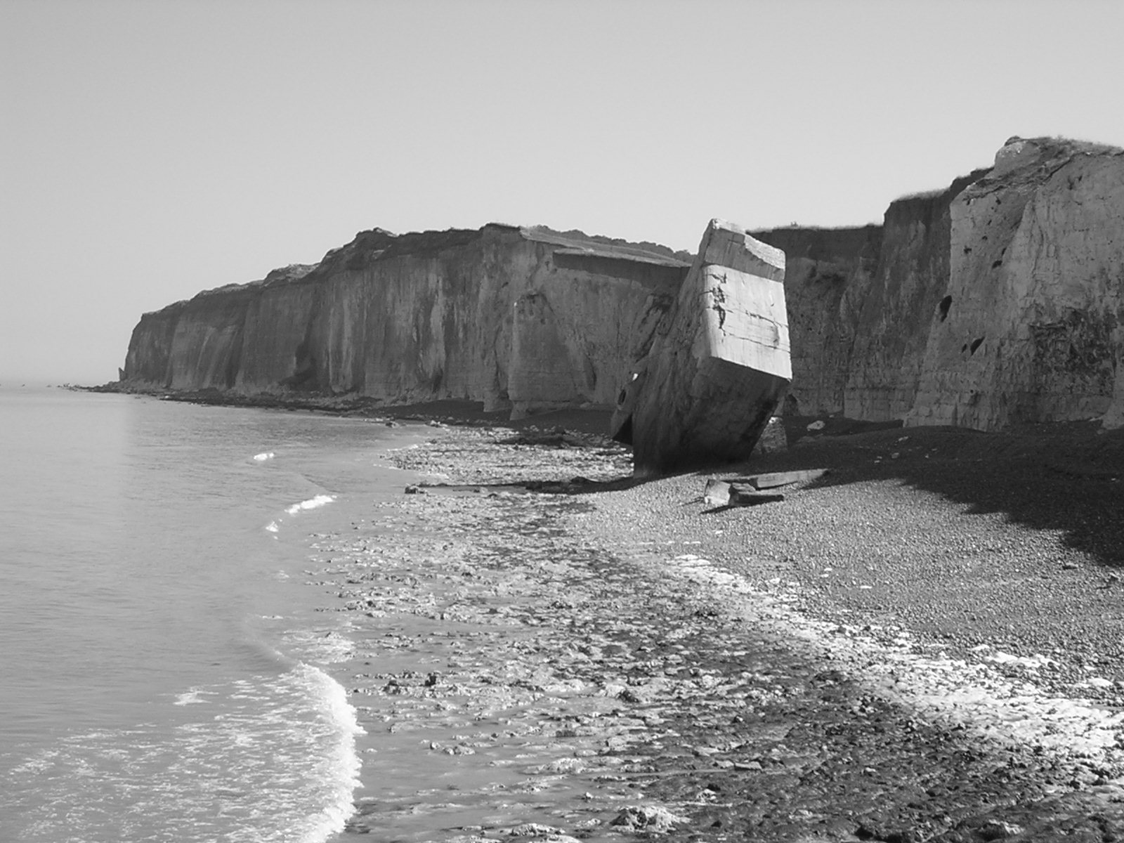 blockhauss Sainte Marguerite